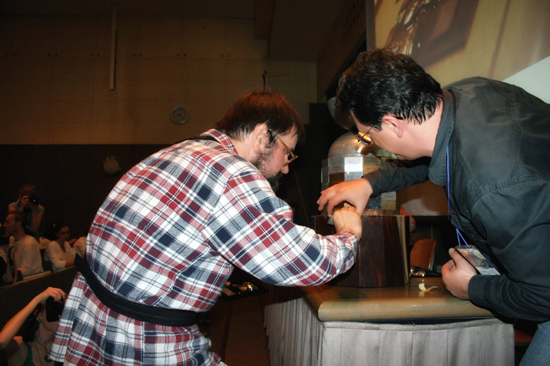 Konvencija Kontakt, koja je spojila 34. SFeraKon i 34. Eurocon u Zagrebu